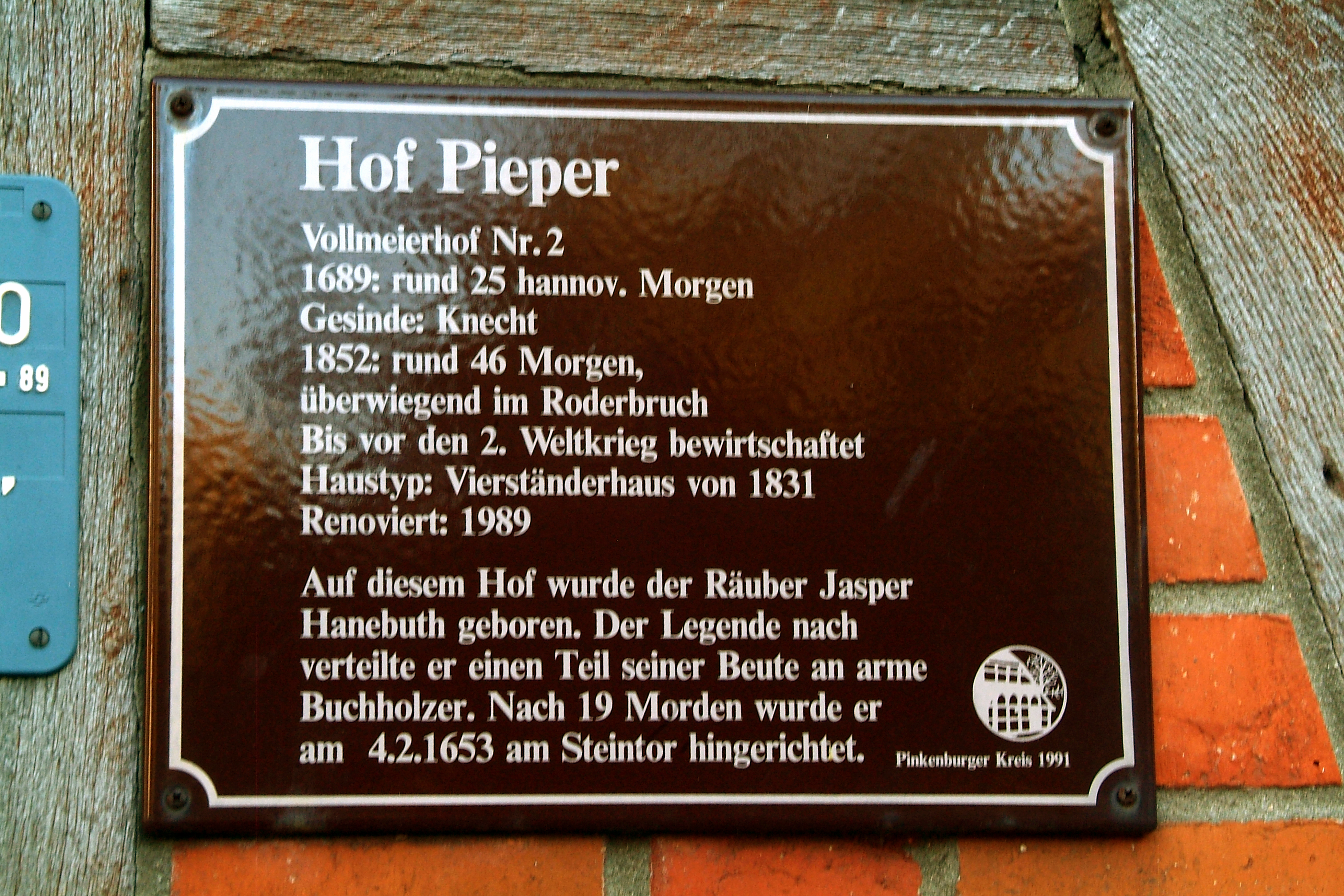 Das 1831 erbaute Fachwerkgebäude Hof Pieper, ein ehemaliger Vollmeierhof, am Groß-Buchholzer Kirchweg 72 in Hannover ist ein Baudenkmal. In dem Vorgängerbau wurde ausweislich einer an der Fassade angebrachten Informationstafel der Räuber und Mörder Jasper Hanebuth geboren.